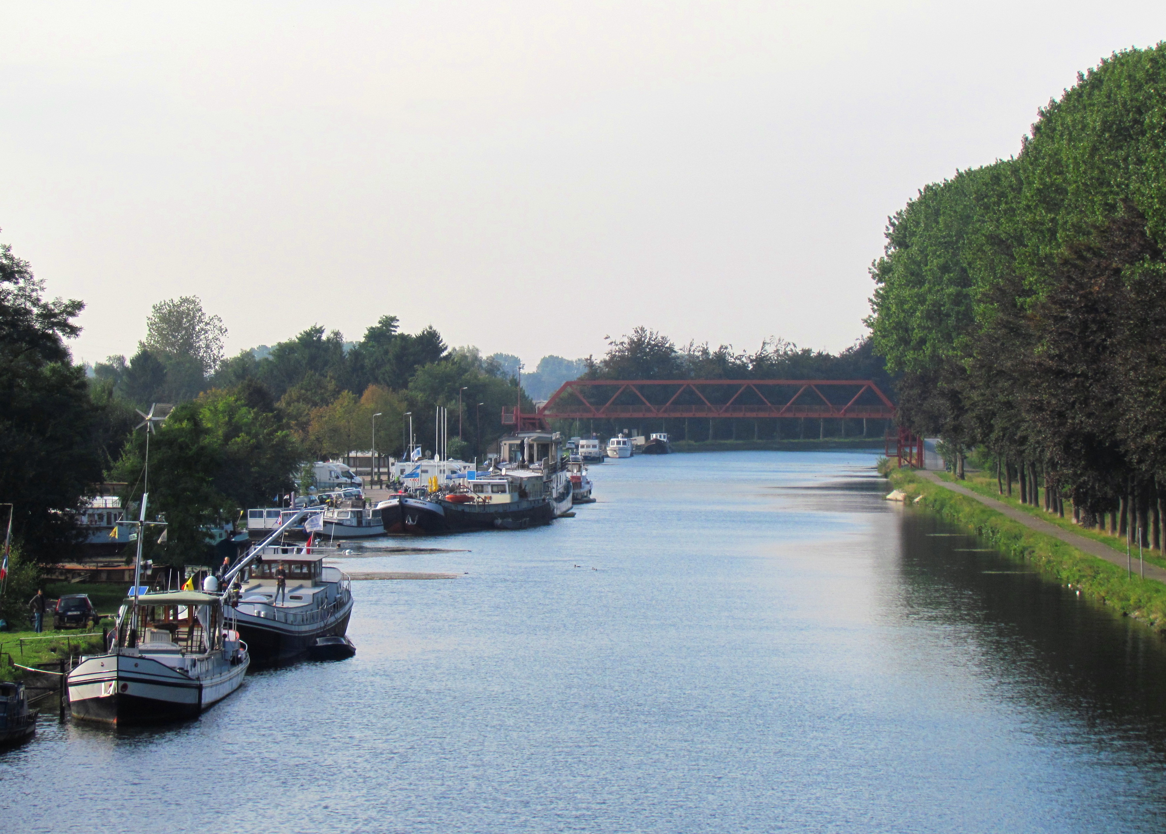 Jachthaven in de Zuid-Willemsvaart bij Bocholt (B)